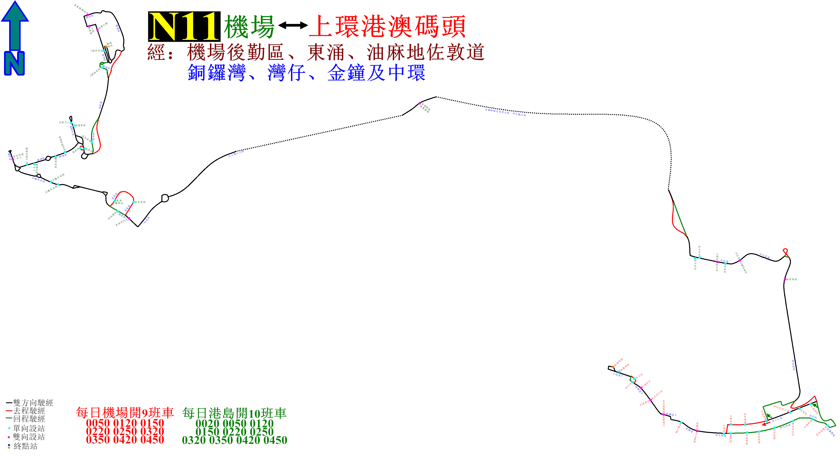 中文（香港）: 城巴N11線的走線圖